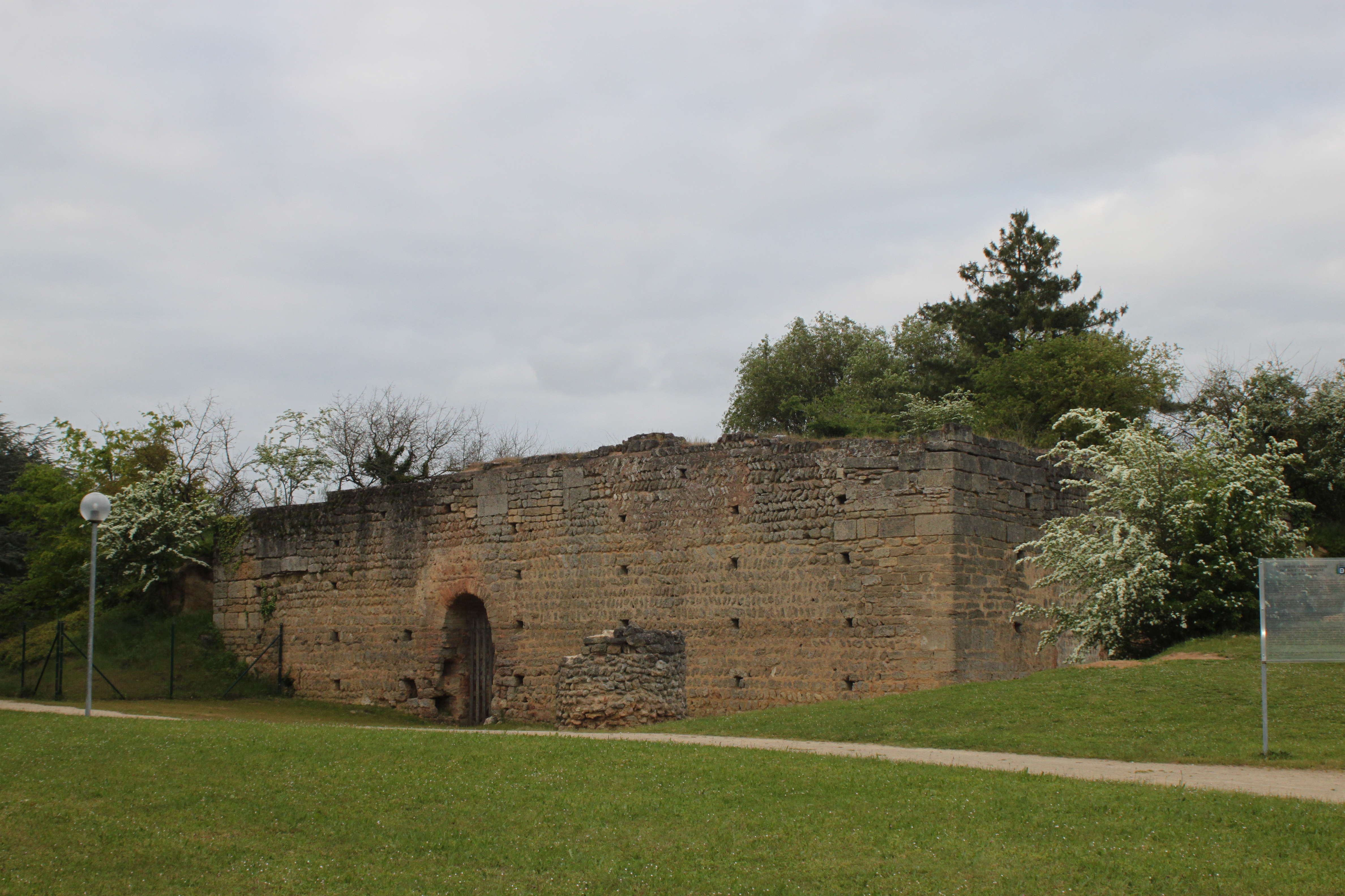 Motte carolingienne, Fr-49-Doué-la-Fontaine.